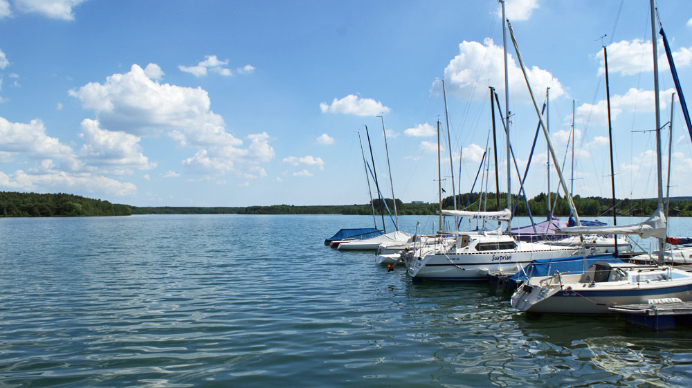 Der Brückelsee im Oberpfälzer Seenland (Gemeinde Wackersdorf, Landkreis Schwandorf)